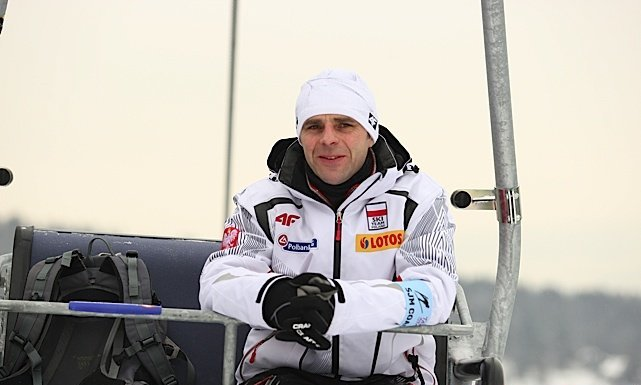 Robert Mateja podczas serii treningowej przed konkursem indywidualnym mężczyzn na Mistrzostwach Świata w Narciarstwie Klasycznym 2011 w Oslo.